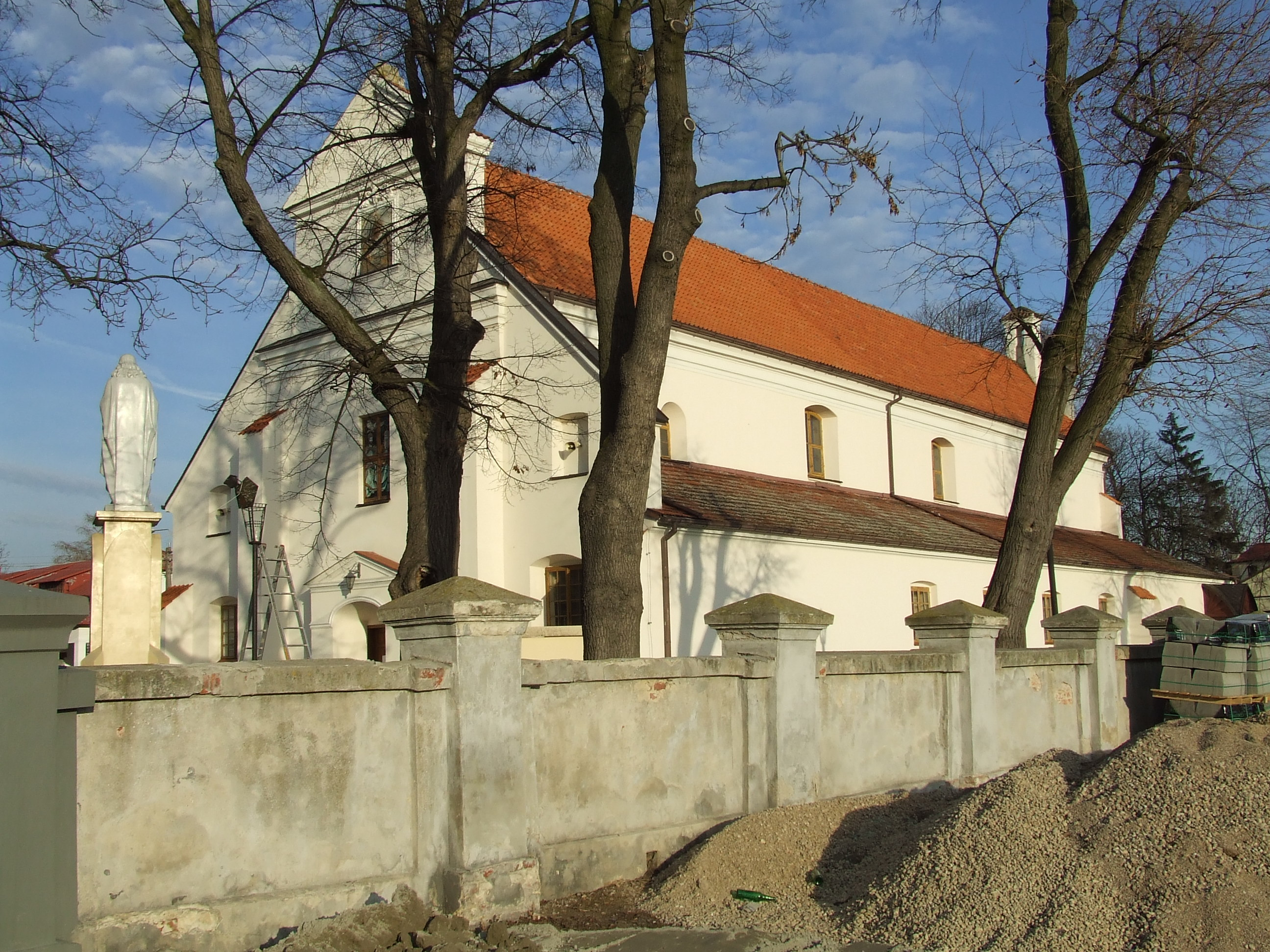 Błonie, kościół p.w. Świętej Trójcy z 1257(zabytek nr rejestr. 1002/129)